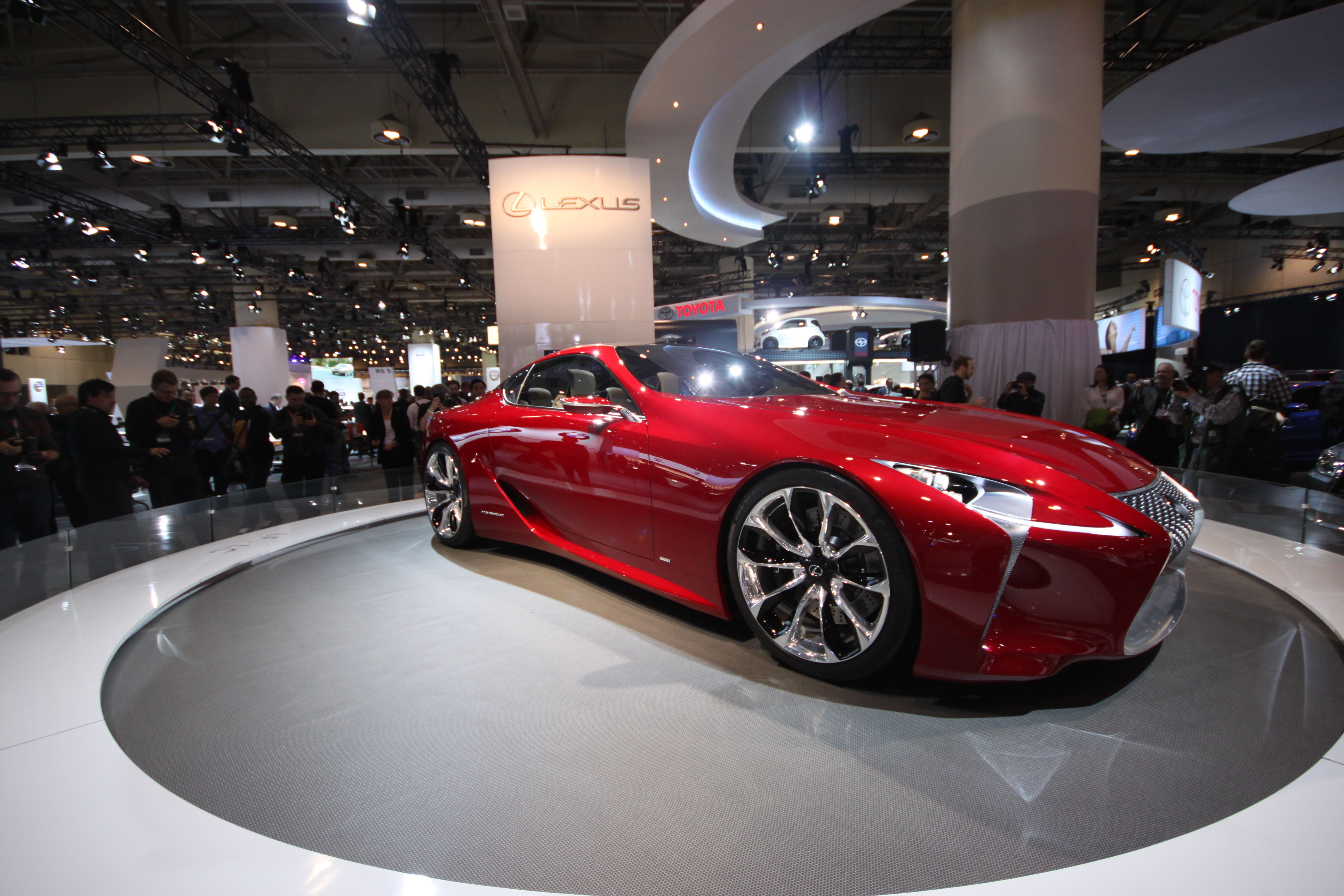 Lexus LF-LC Concept